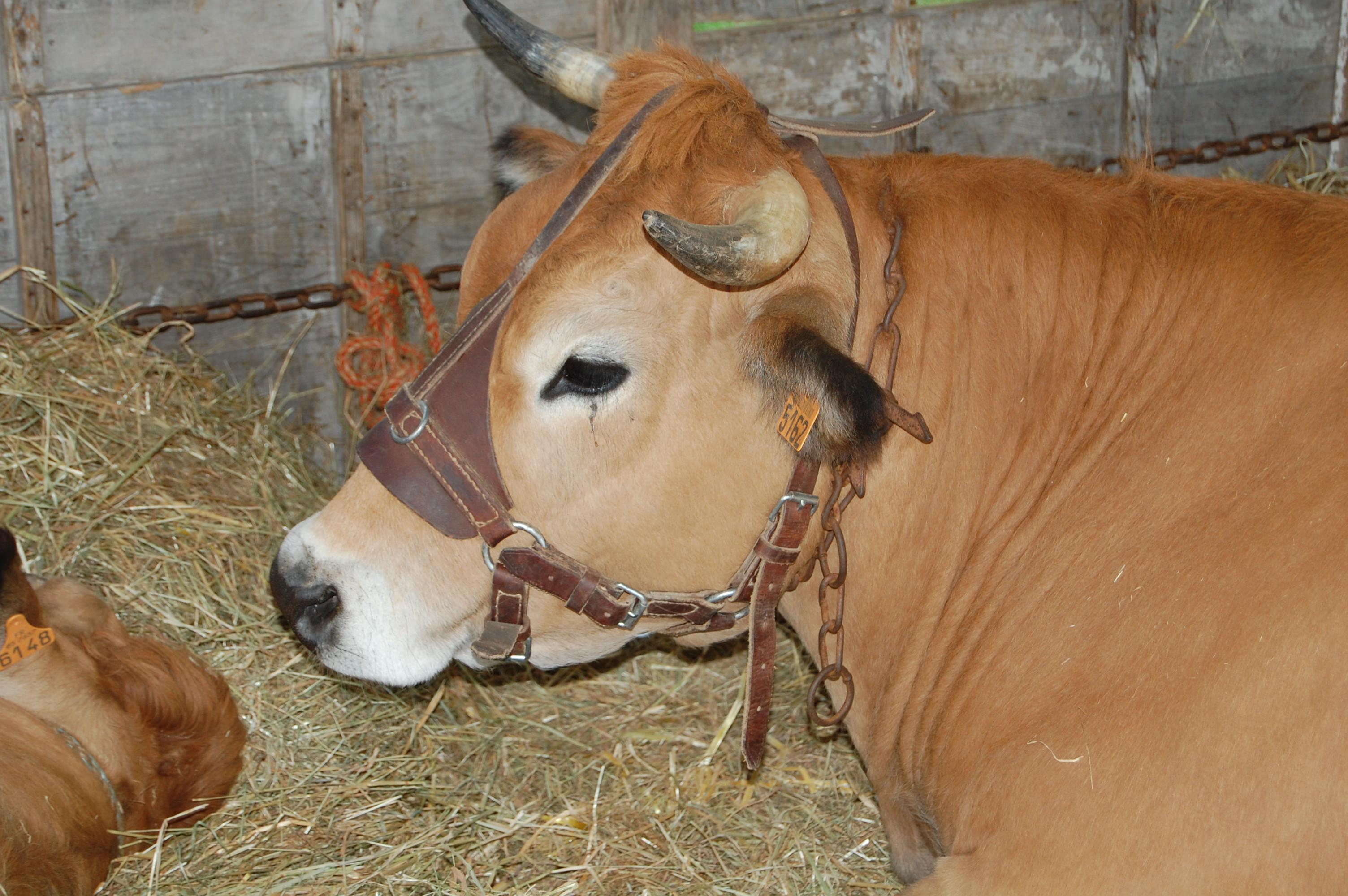 Tête d'une vache de race parthenaise